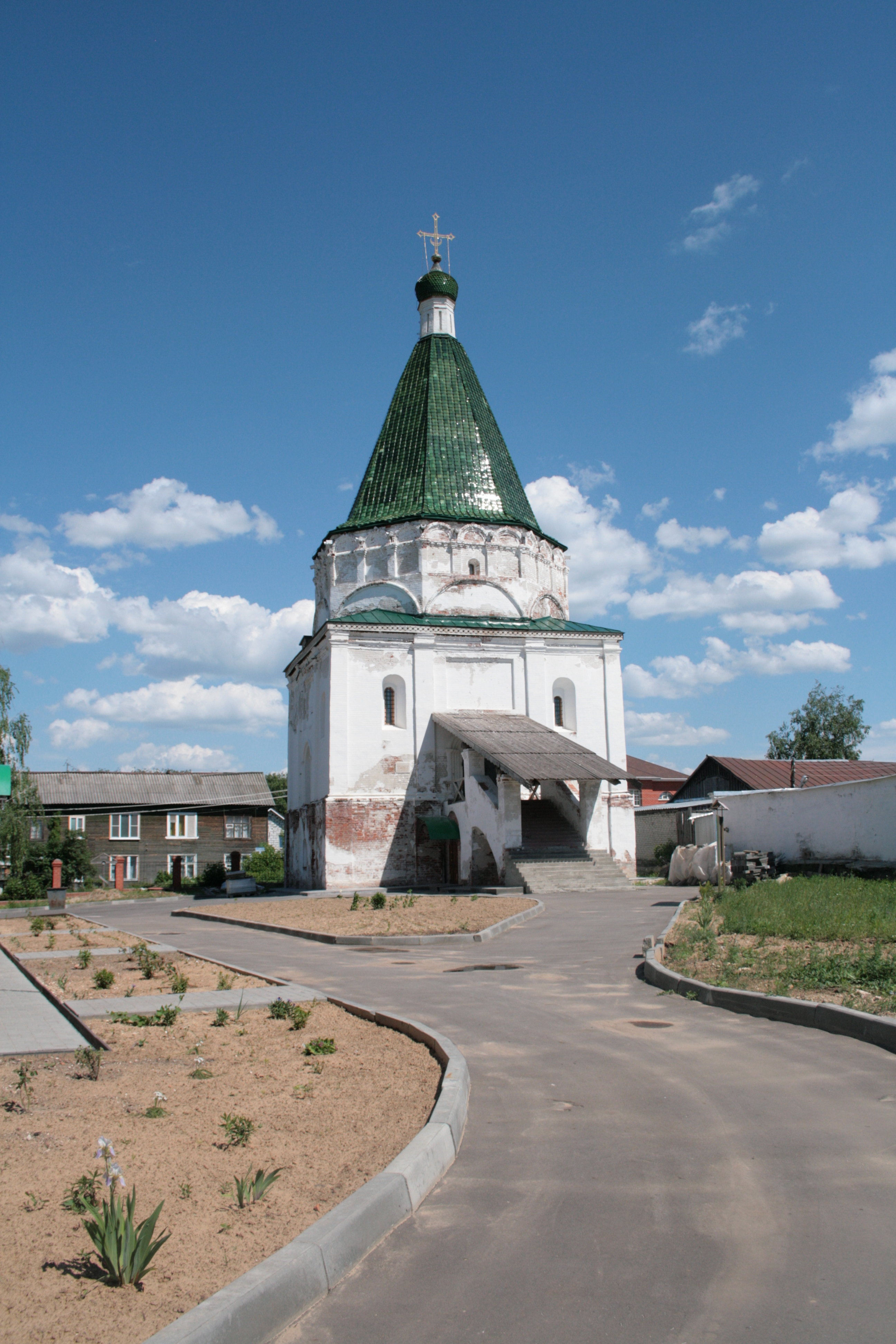 Церковь Никольская (святителя Николая) (Нижегородская область, Балахна, Революции улица, 17, Пионерский переулок, 3)